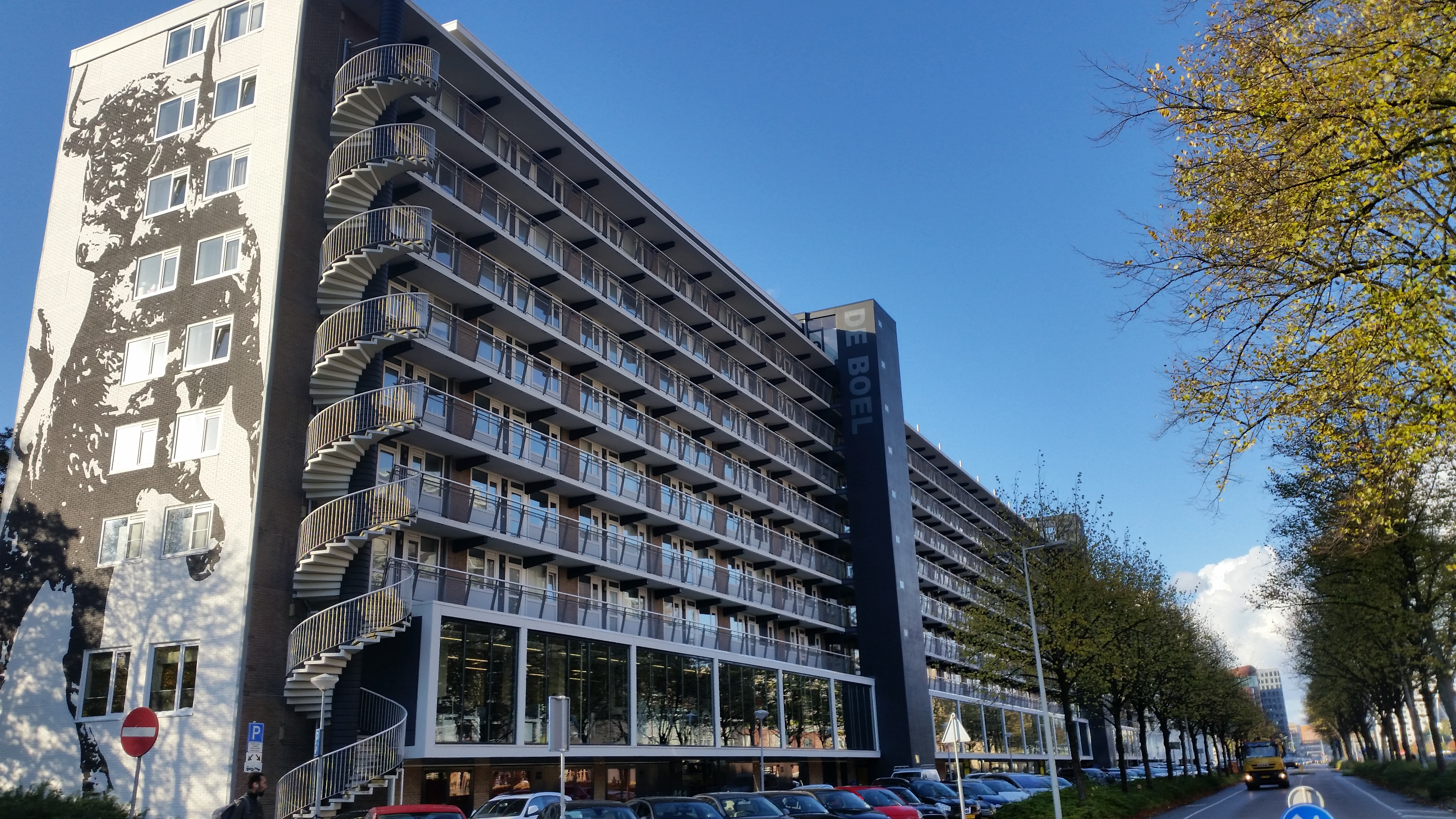 Mural van Victor Ash op flat De Boel aan de De Boelelaan, Amsterdam-Zuid